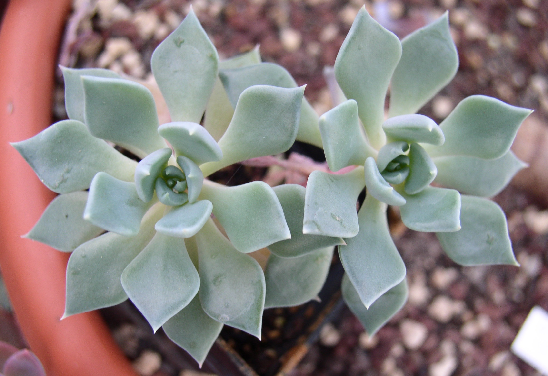 Echeveria heterosepala, collection nationale CCVS Echeveria. La photo a été prise le 10/09/2008. Cette espèce est originaire du Centre Est du Mexique, des Étas de Puebla et Oaxaca. Elle pousse en terrain plat dans une zone plus désertique que les autres espèces. Elle est plus difficile à cultiver.